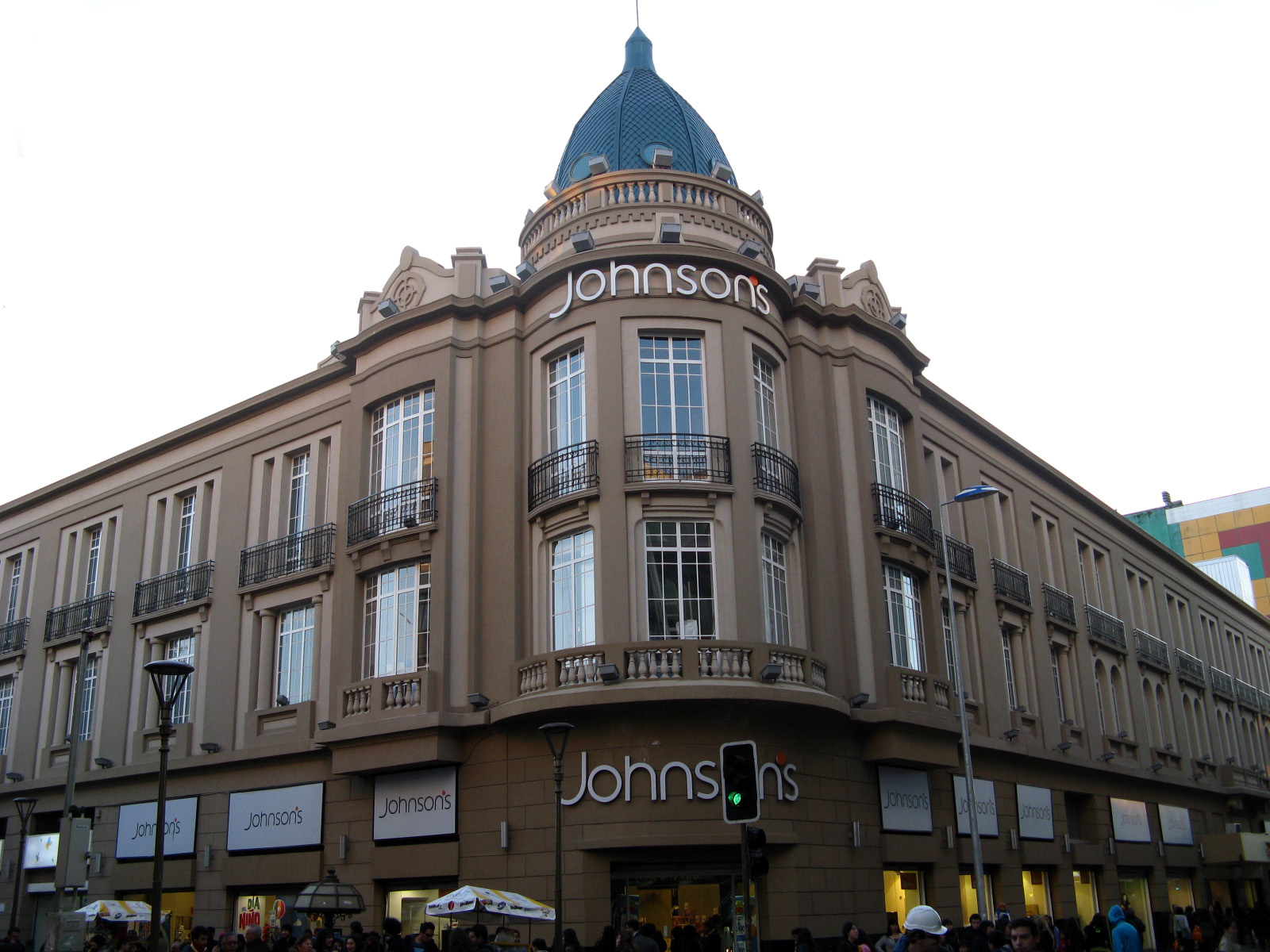 Palacio Hirmas, Concepción, Chile Julio de 2012